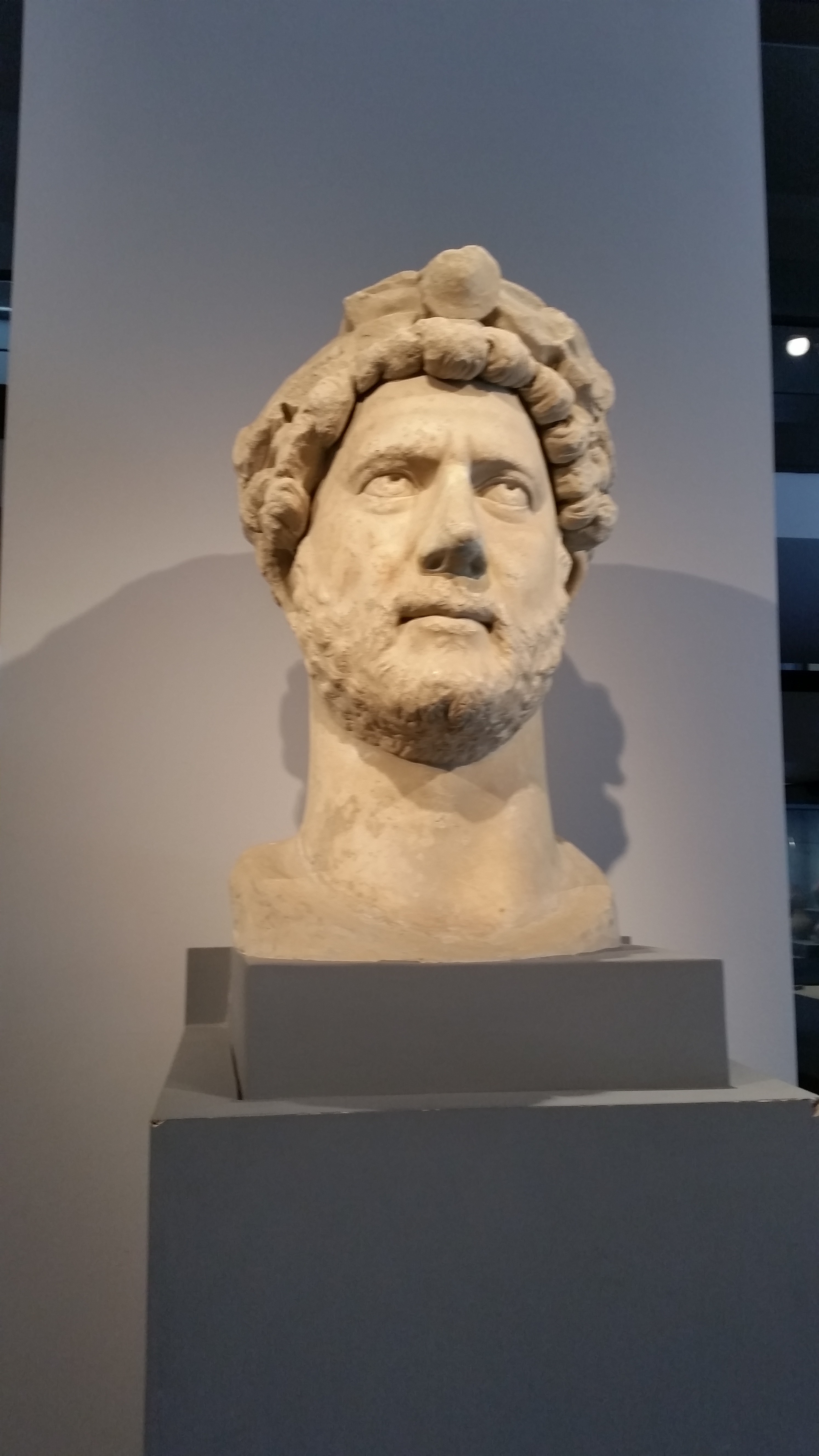 Testa di statua colossale dell'imperatore Adriano